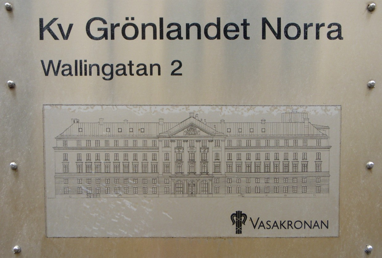 Skylt vid Westmanska Palatset, Wallingatan 2 i Stockholm